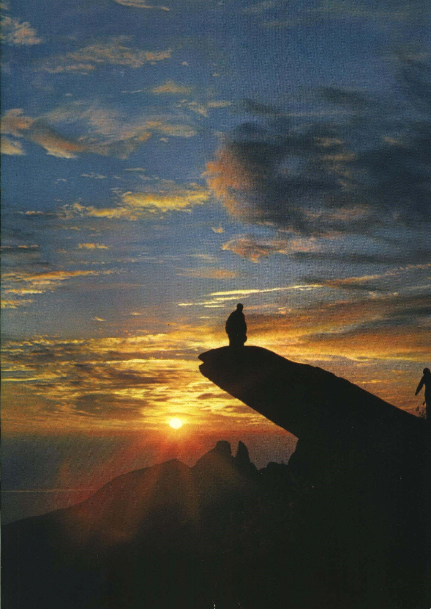 1963-07 1963年 泰山日出